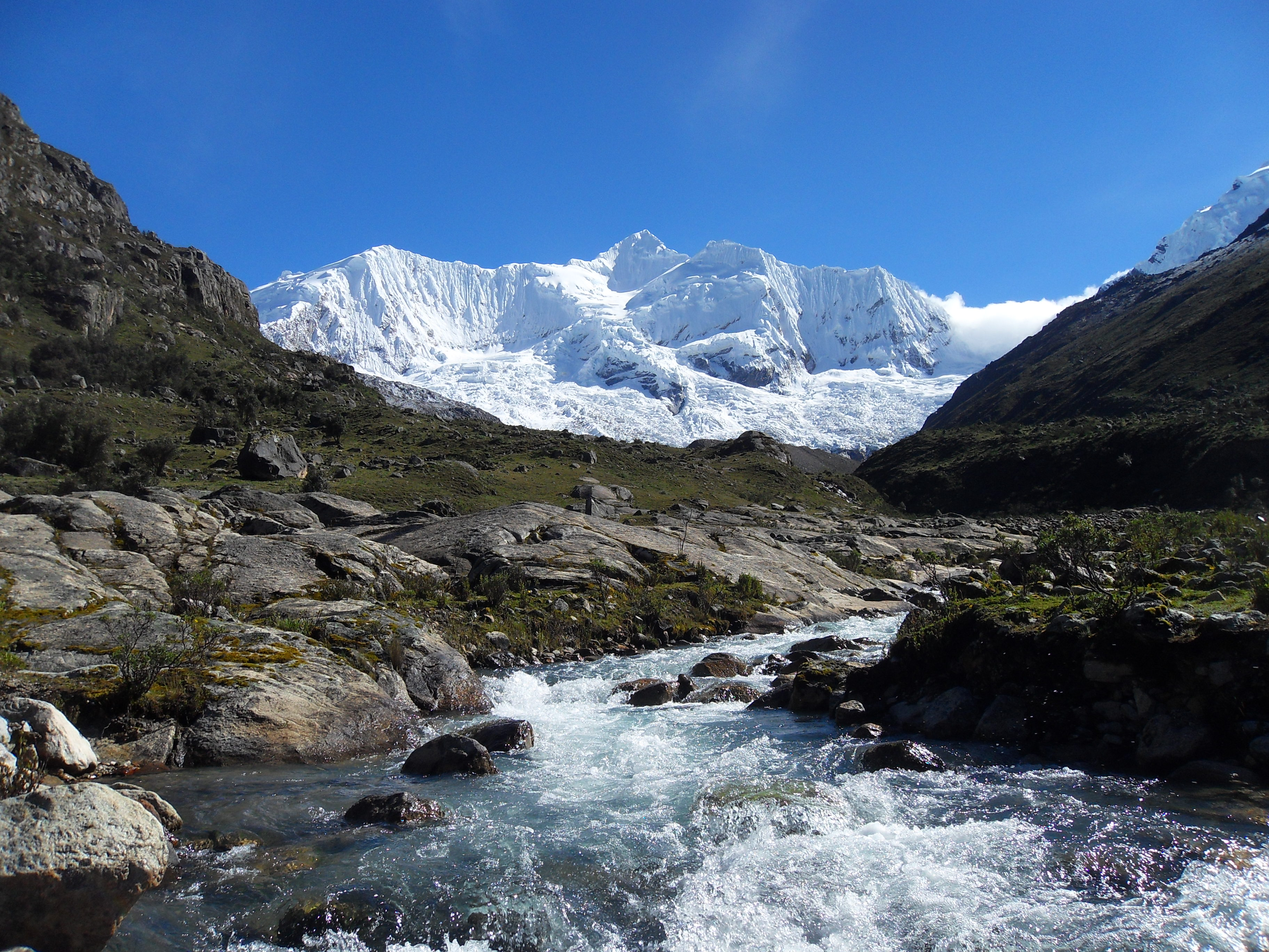 Foto tomada desde el valle de Cojup en marzo del 2010, Cordillera Blanca, Áncash - Perú.